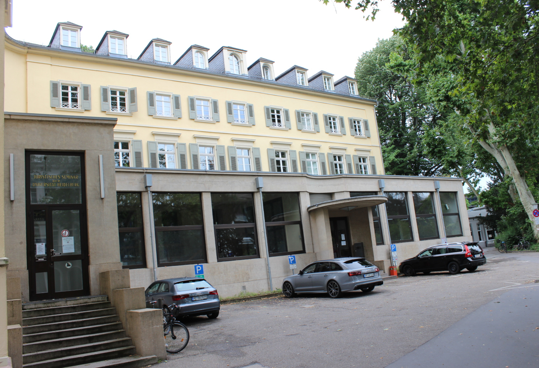 Foto der Eingangsfassade des Juristischen Seminars in der Friedrich-Ebert-Anlage 6-10